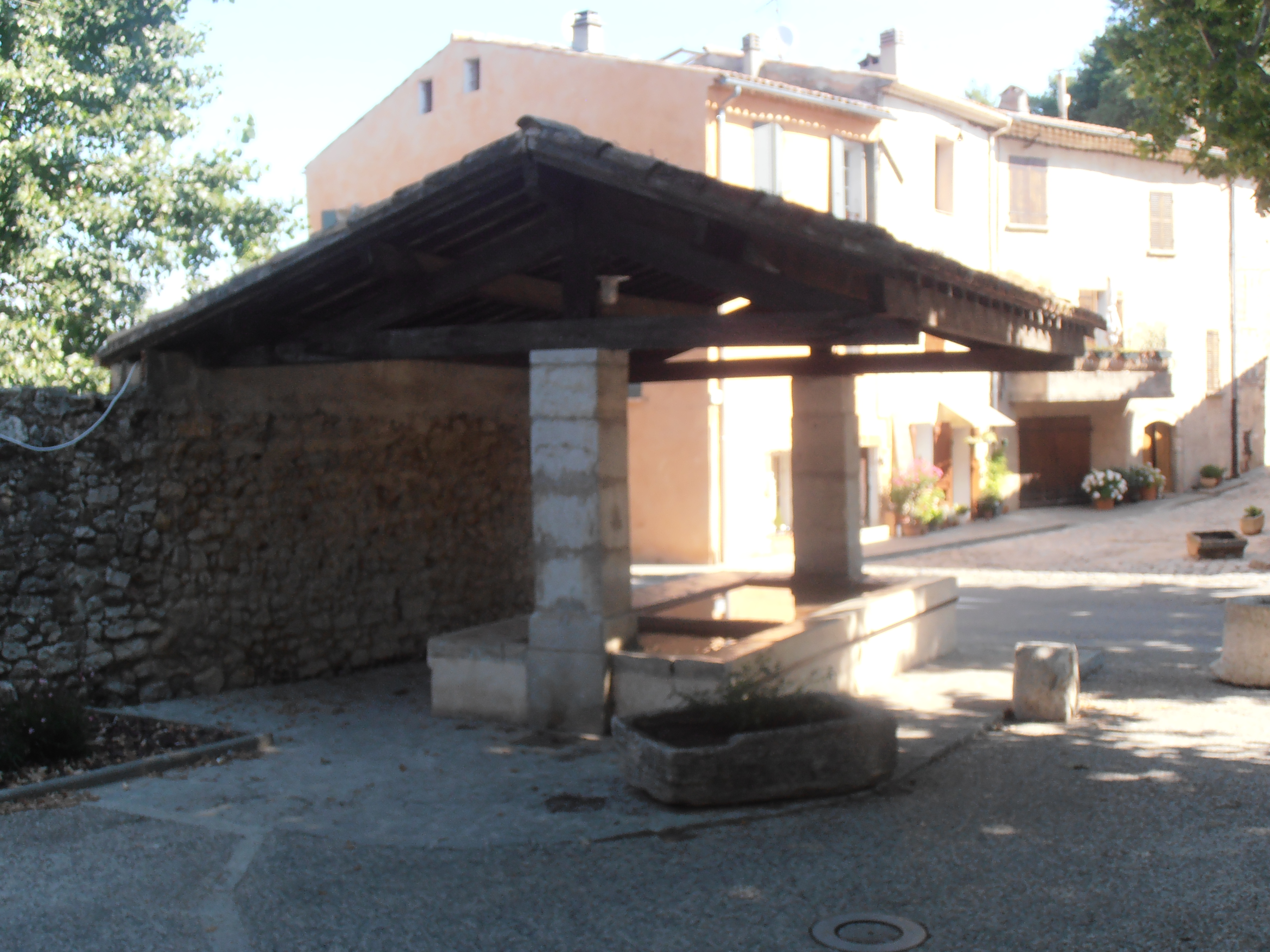 Var, La celle, lavoir devant l'abbaye